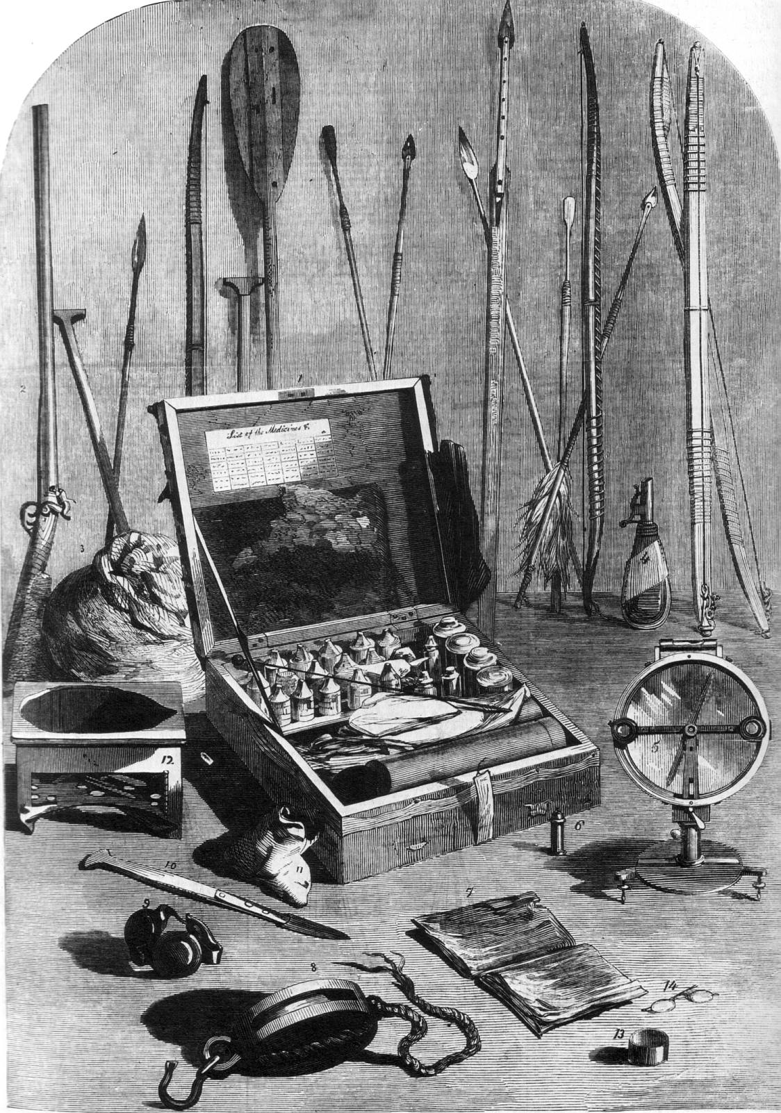 Fundstücke der Erebus und Terror der Franklin Expedition, 1857 gefunden von Leopold McClintock